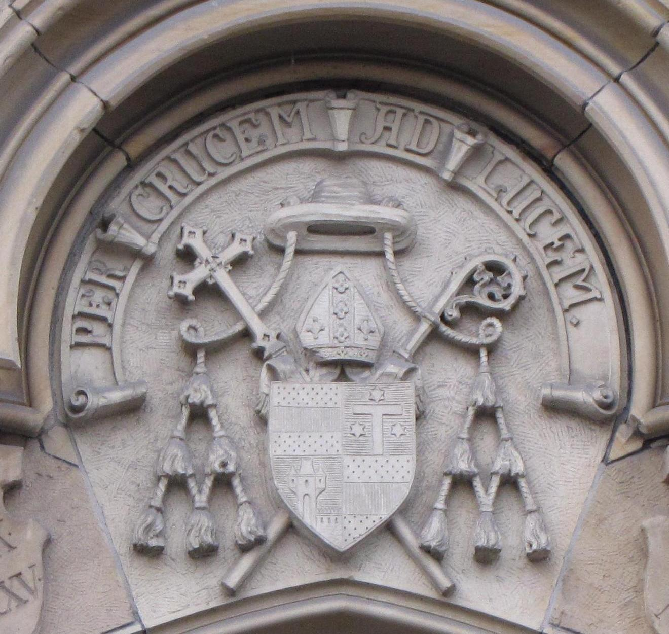 Wappen von Bischof Hermann Josef Dingelstad über dem Eingang des Collegium Ludgerianum in Münster; im linken unteren Feld das Wappen von Vechta, im rechten oberen das des Collegium Augustinianum Gaesdonck